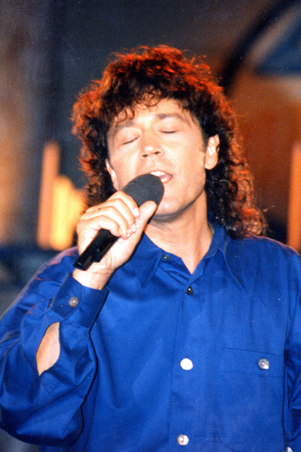 Dennie Christian, opgenomen tijdens het "Schlagerfestival" in Kerkrade.